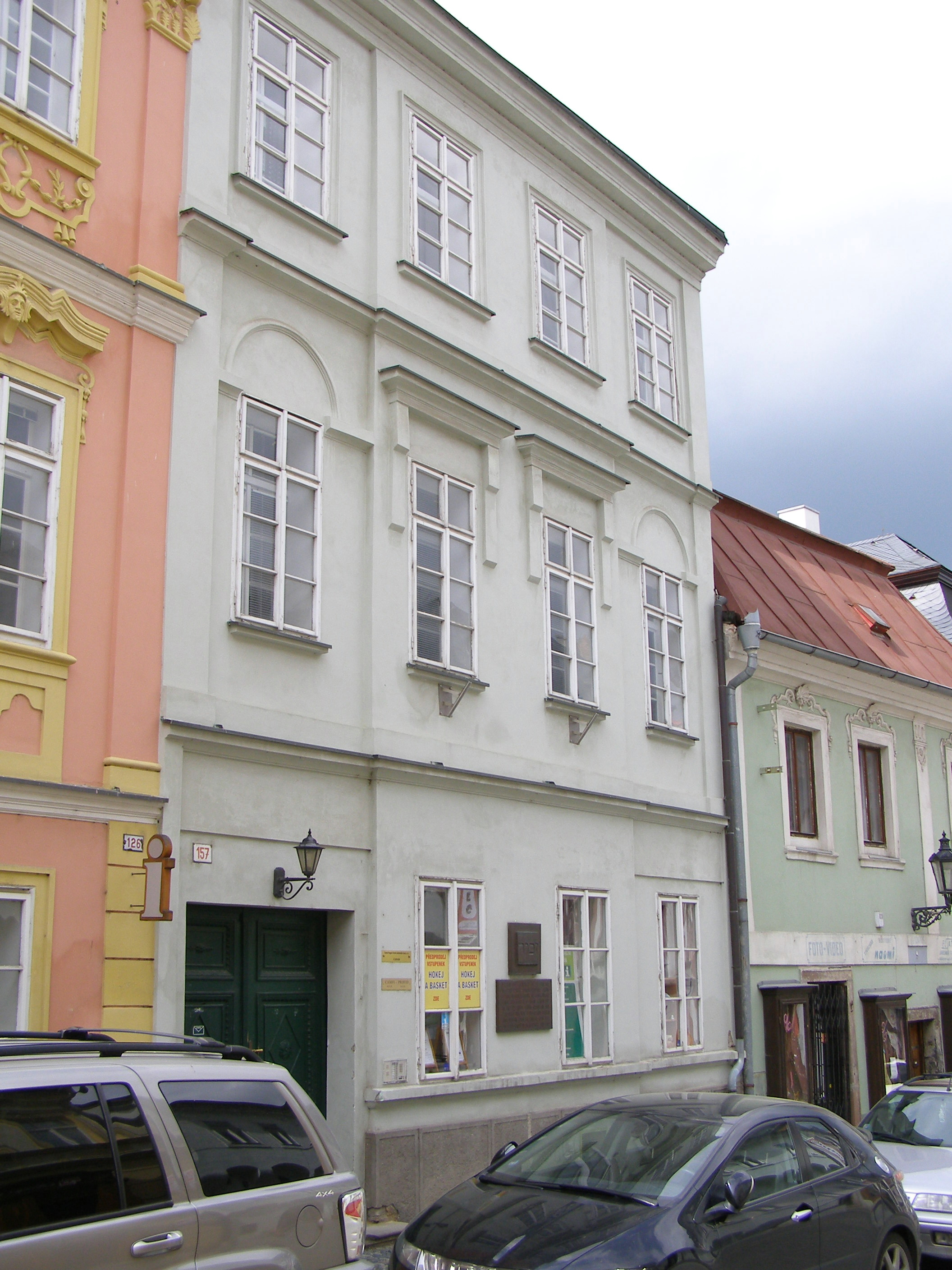 Jüdisches Viertel in Kolín (Tschechische Republik) heute, Na Hradbách 157 - ehemalige jüdische Schule und Eingang zur Synagoge